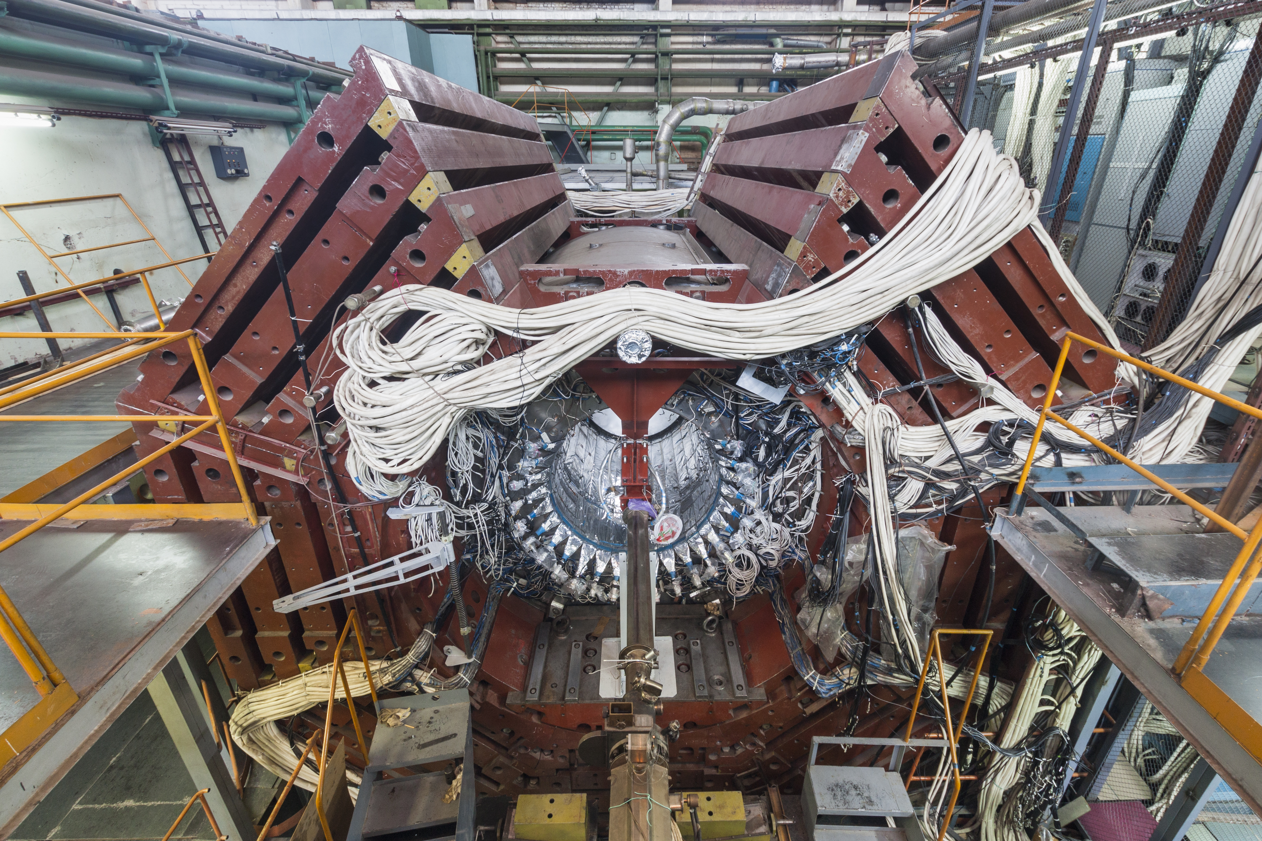 Детектор элементарных частиц КЕДР, установленный на ускорителе ВЭПП-4М. Это самый большой детектор Института ядерной физики СО РАН. На снимке детектор собирают после плановой модернизации.